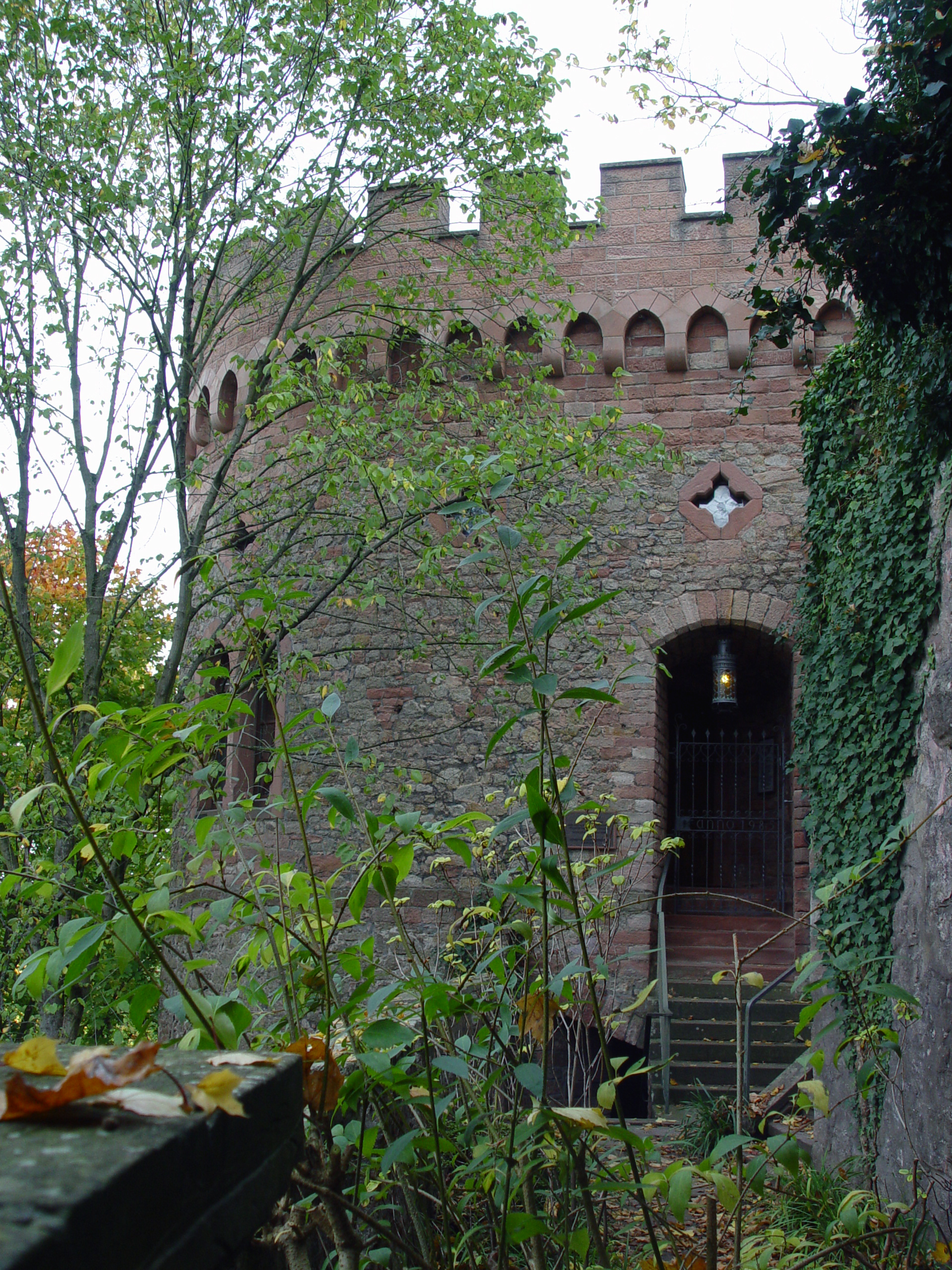 Der Malerturm der Burganlage Schloss Ortenberg